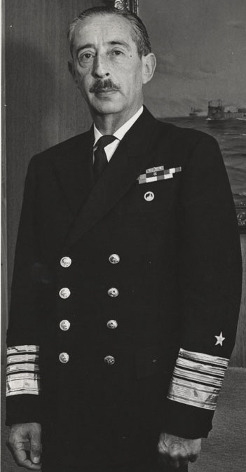 José Toribio Merino Castro, Miembro de la Junta de Gobierno de Chile (1973 - 1990).